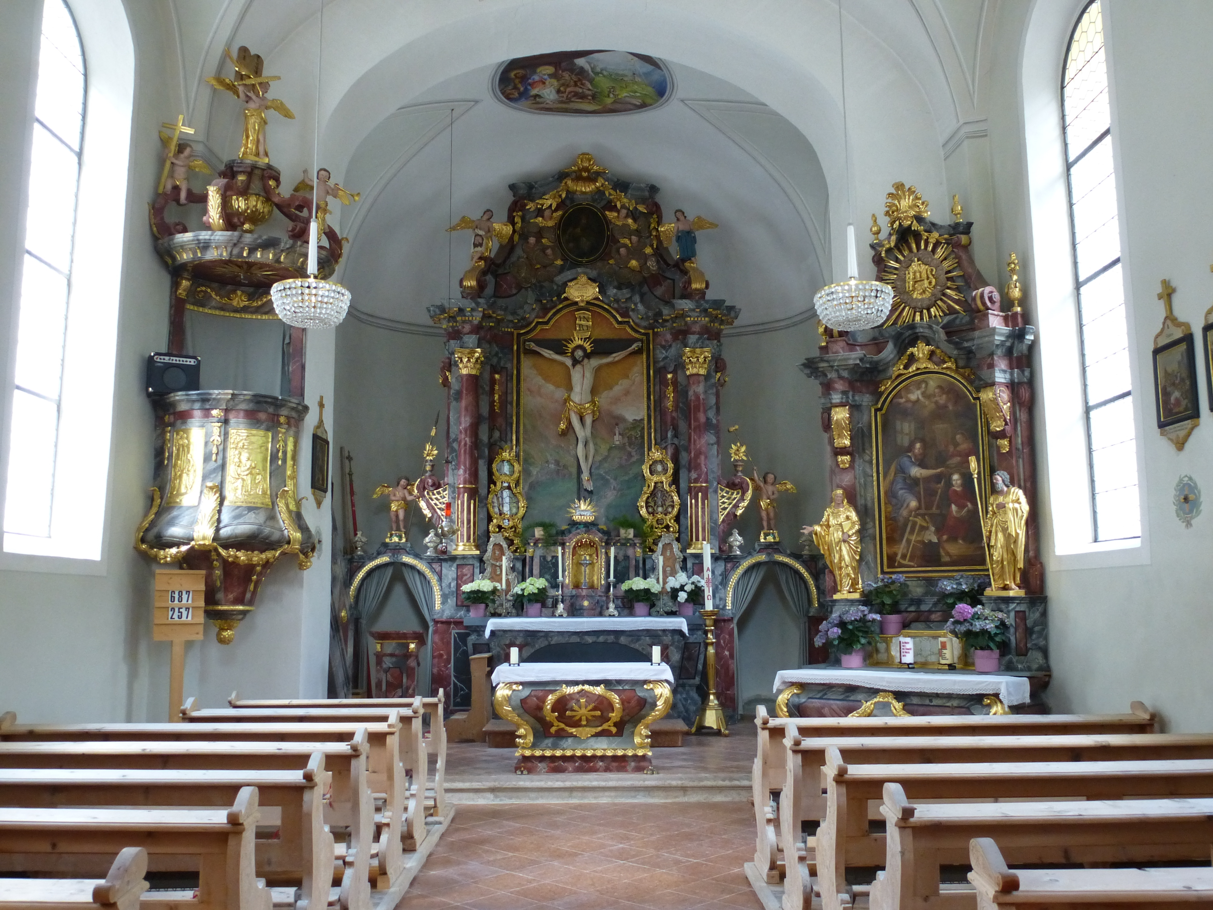 Kaplaneikirche zur Kreuzauffindung und Friedhof mit Kapelle in Heiligkreuz; Innenraum